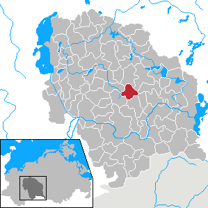 Herzberg in Mecklenburg-Vorpommern - District Parchim